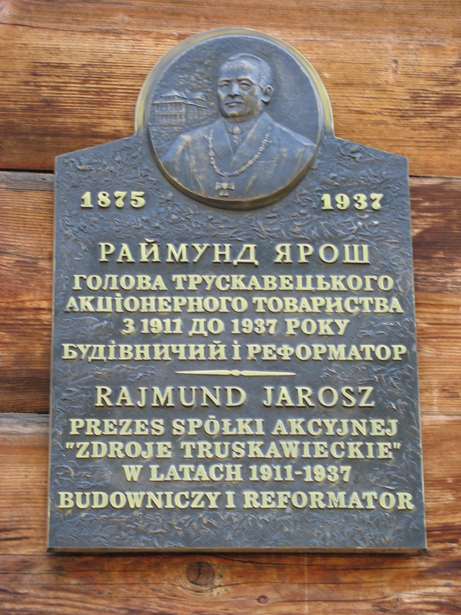 Меморіальна дошка Ярошу Раймунду, будівничому Трускавця початку ХХ століття, реформатору